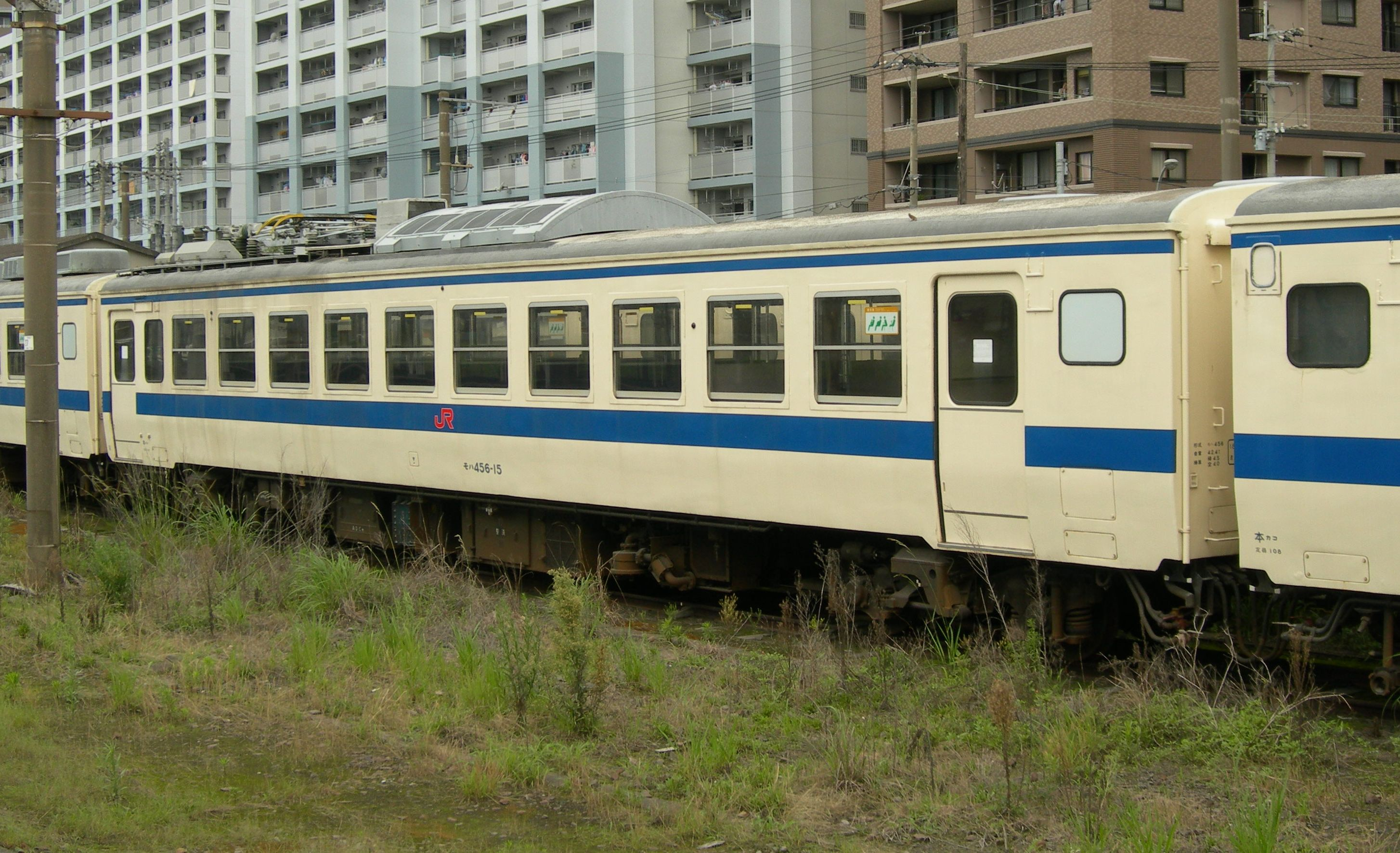 国鉄457系電車 モハ456